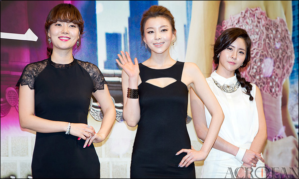 tvN 수목 드라마 인현왕후의 남자 제작 발표회에 참석한 가득희, 박영린, 진예솔